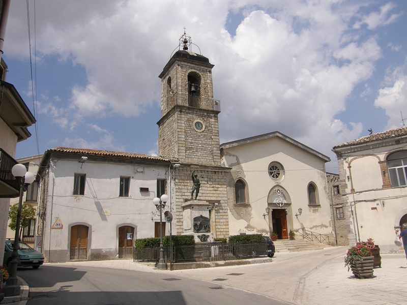 Apulia Molise Campania 2009